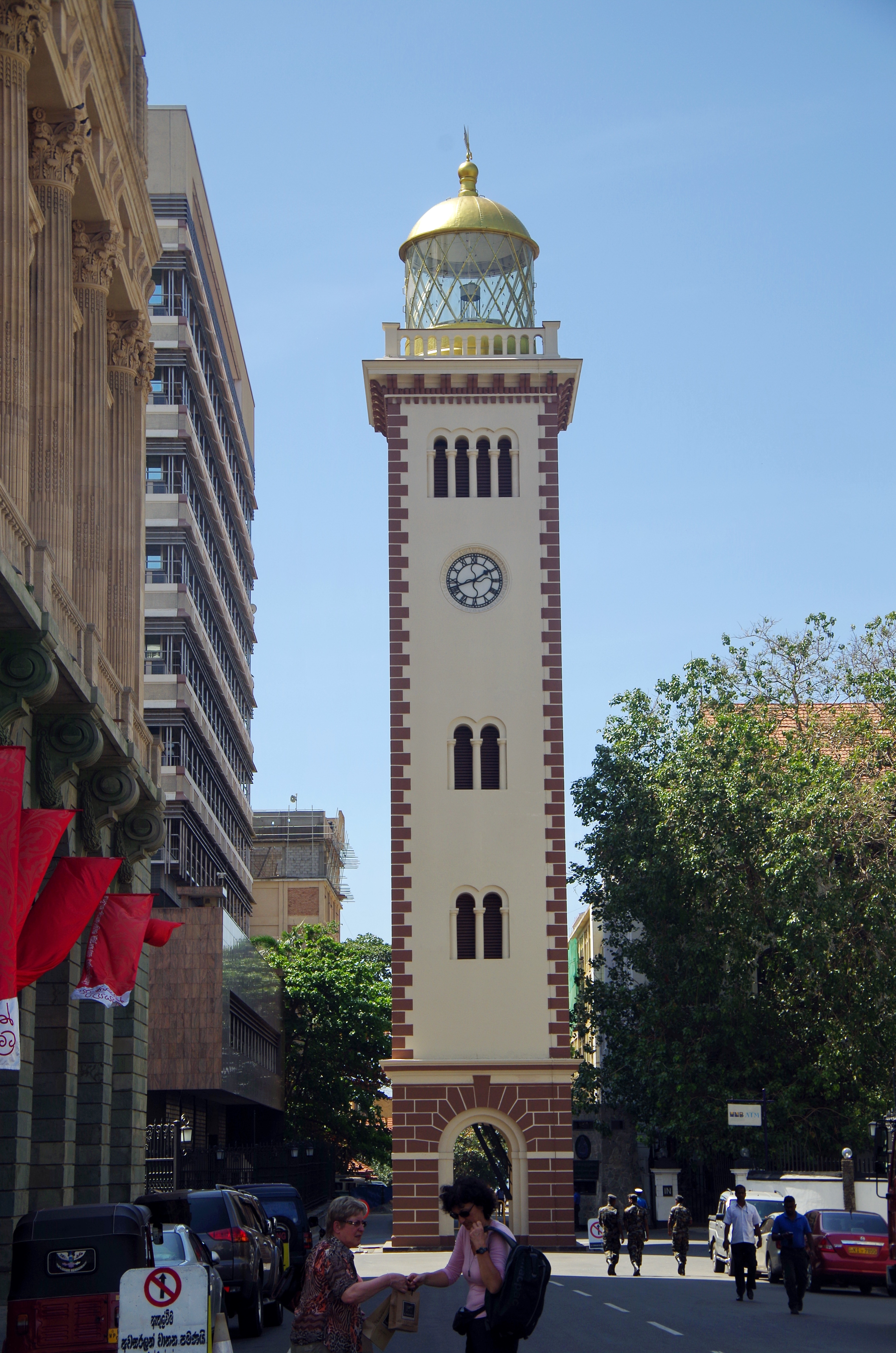 Uhr Uhrturm Colombo